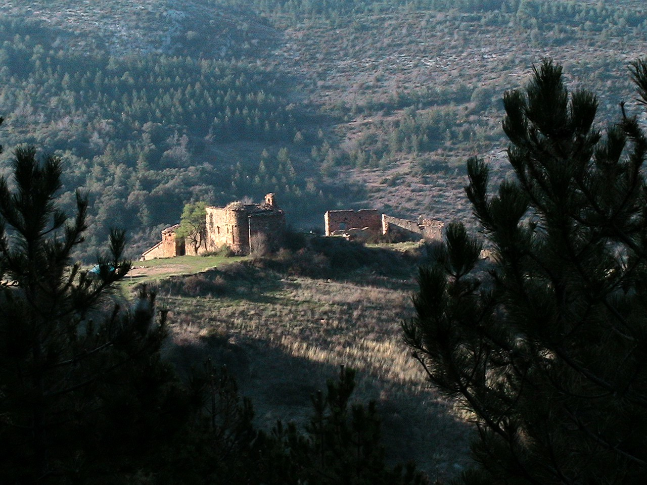 Castell i església de Santa Maria de Rúbies (Camarasa) des de la Portella Blanca